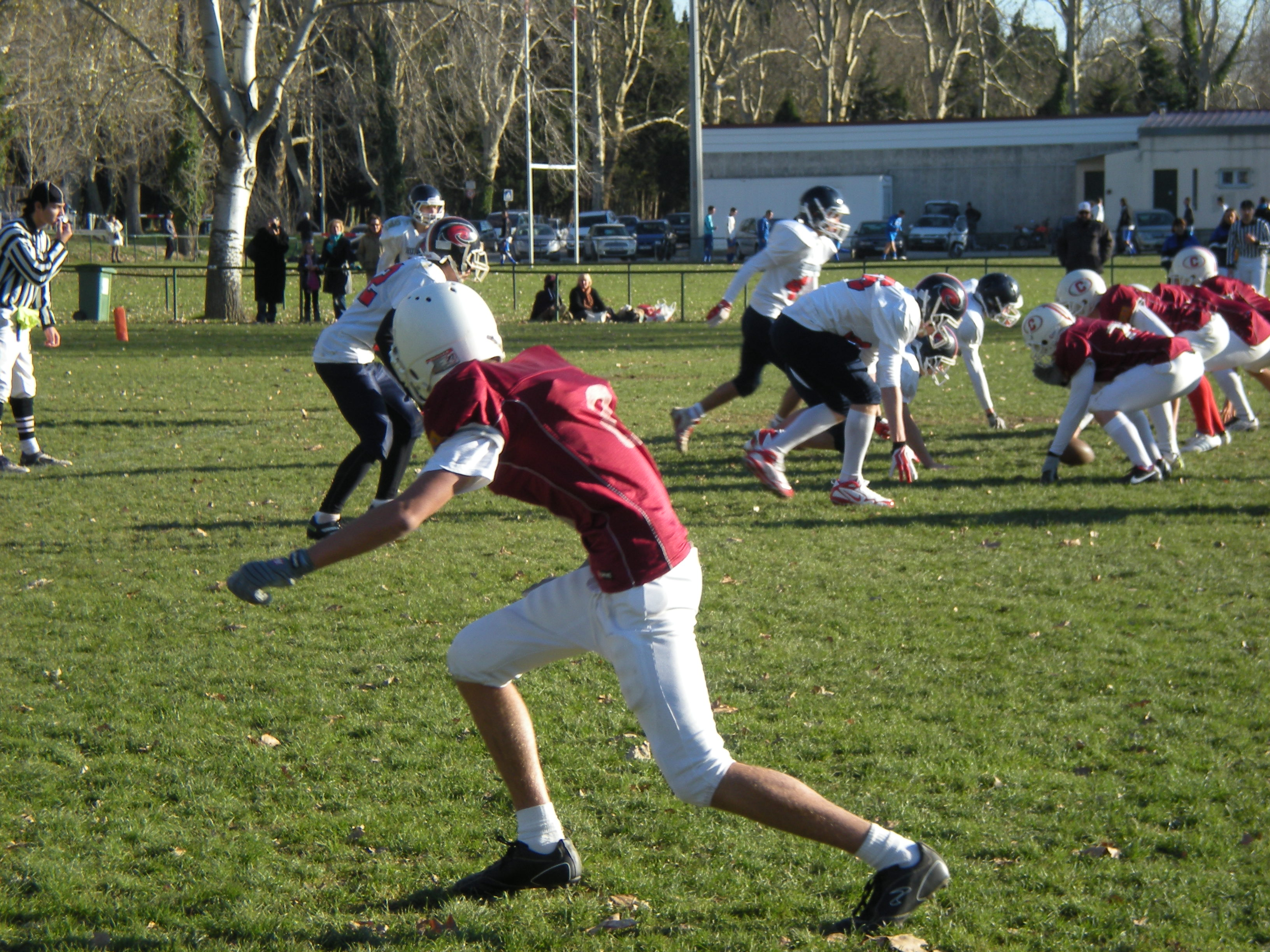 American football, Nîmes vs Montpellier en U17, complexe sportif de La Bastide, rte de Generac à Nîmes, 09.12.12.